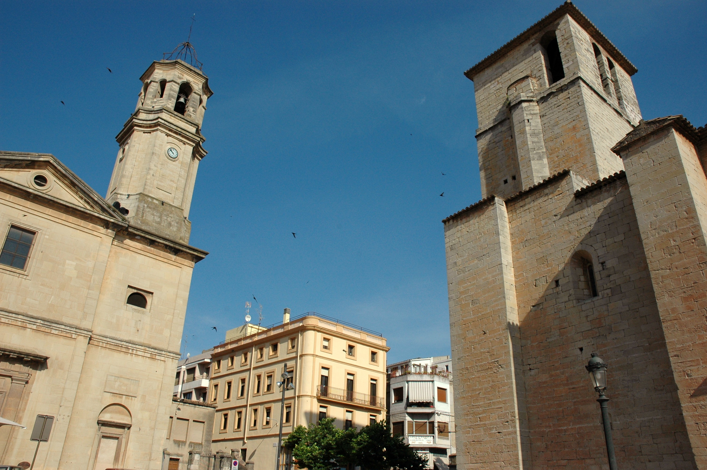 Esglésies de l'Espluga de Francolí: Sant Miquel (església vella) a la dreta: Església nova a l'esquerra